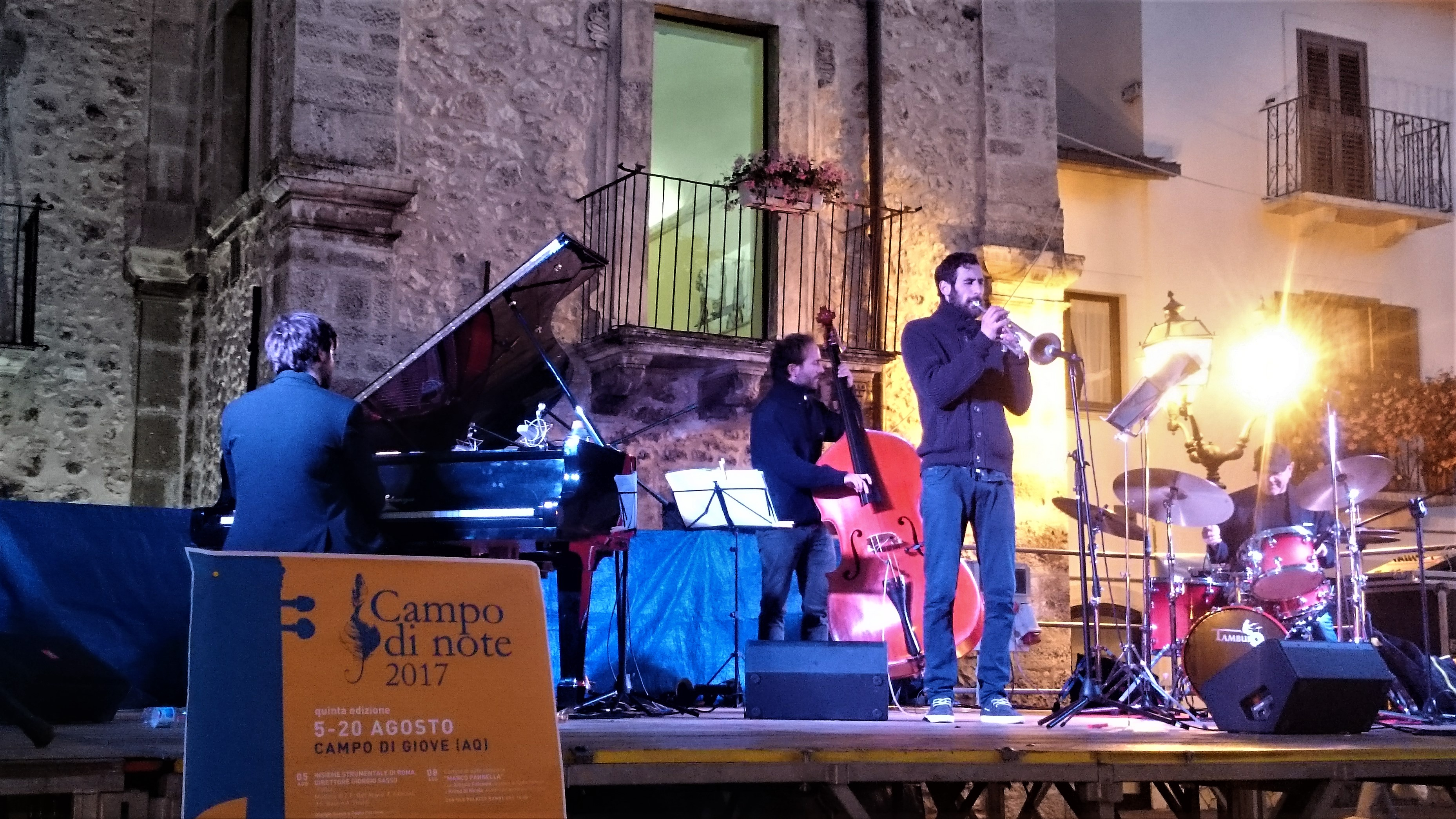 Roberto Gatto